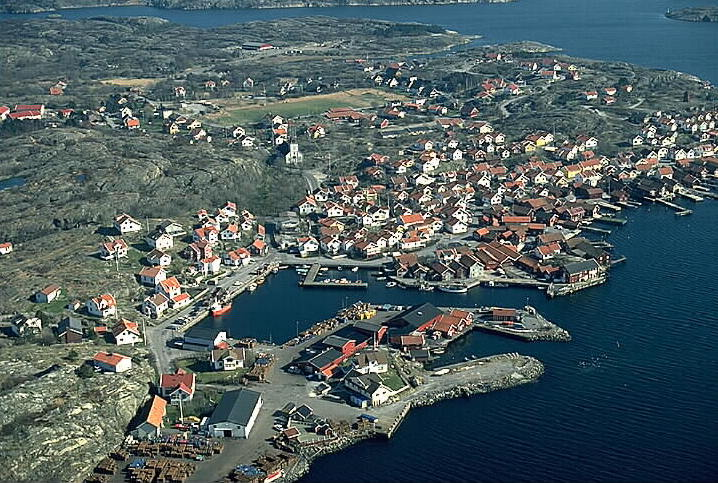 Motiv: Mollösund Nyckelord: Flygbilder, Naturreservat, Riksintressen Kategori: Fiskeläge Mollösund